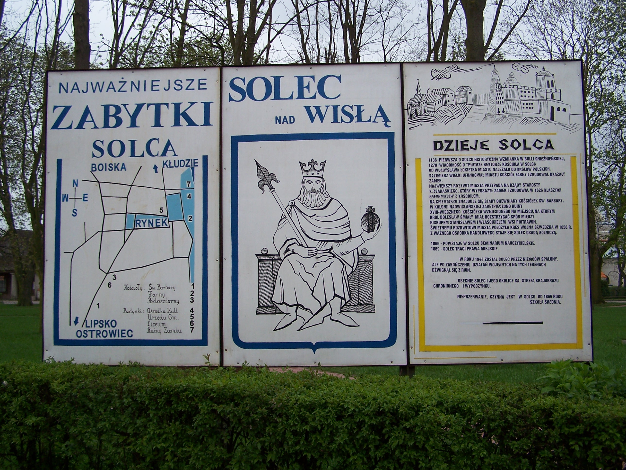 Tablica w parku w Solcu nad Wisłą